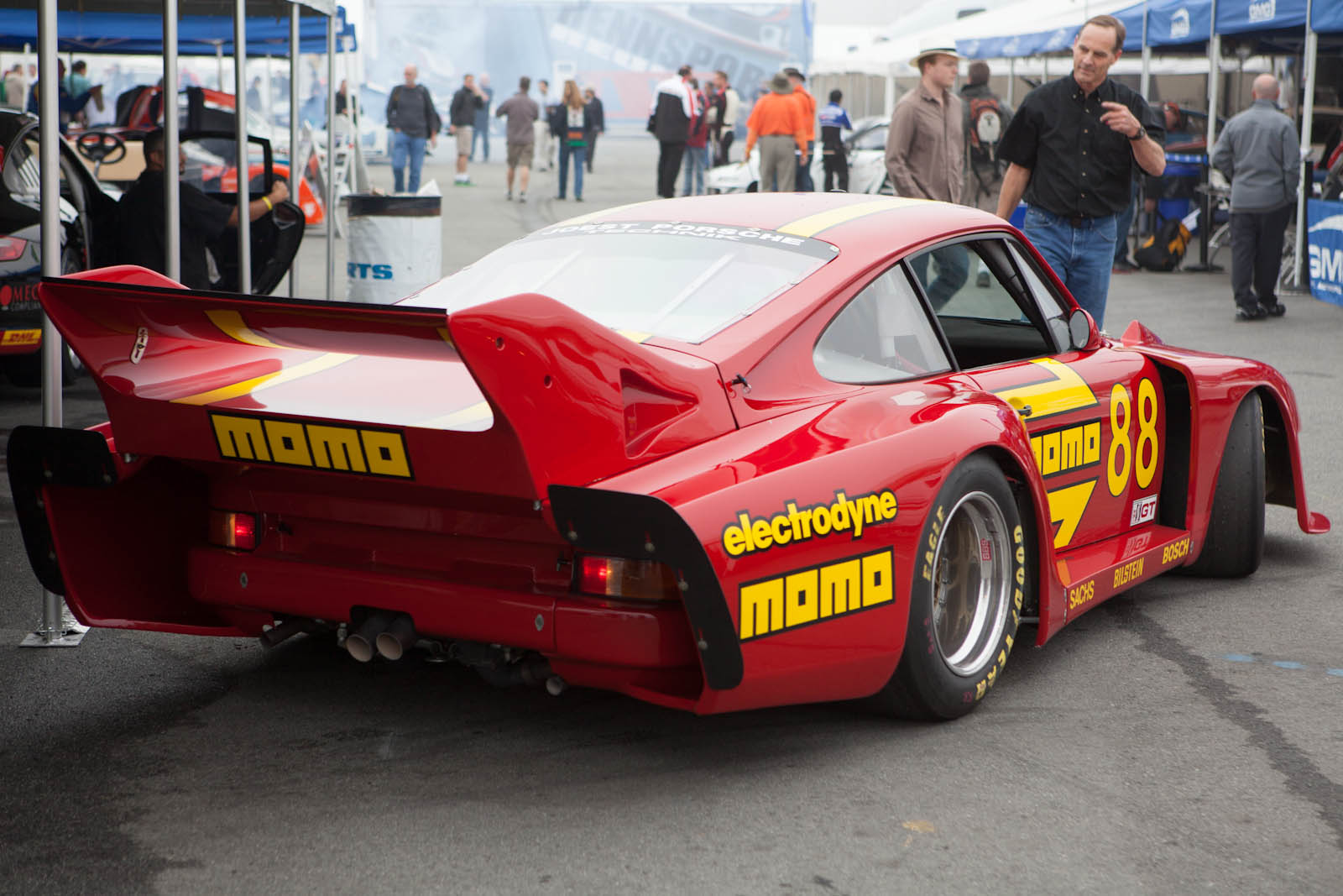 Porsche Rennsport Reunion IV